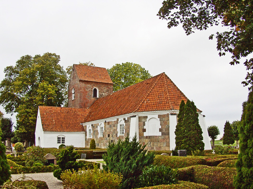 fra sydøst